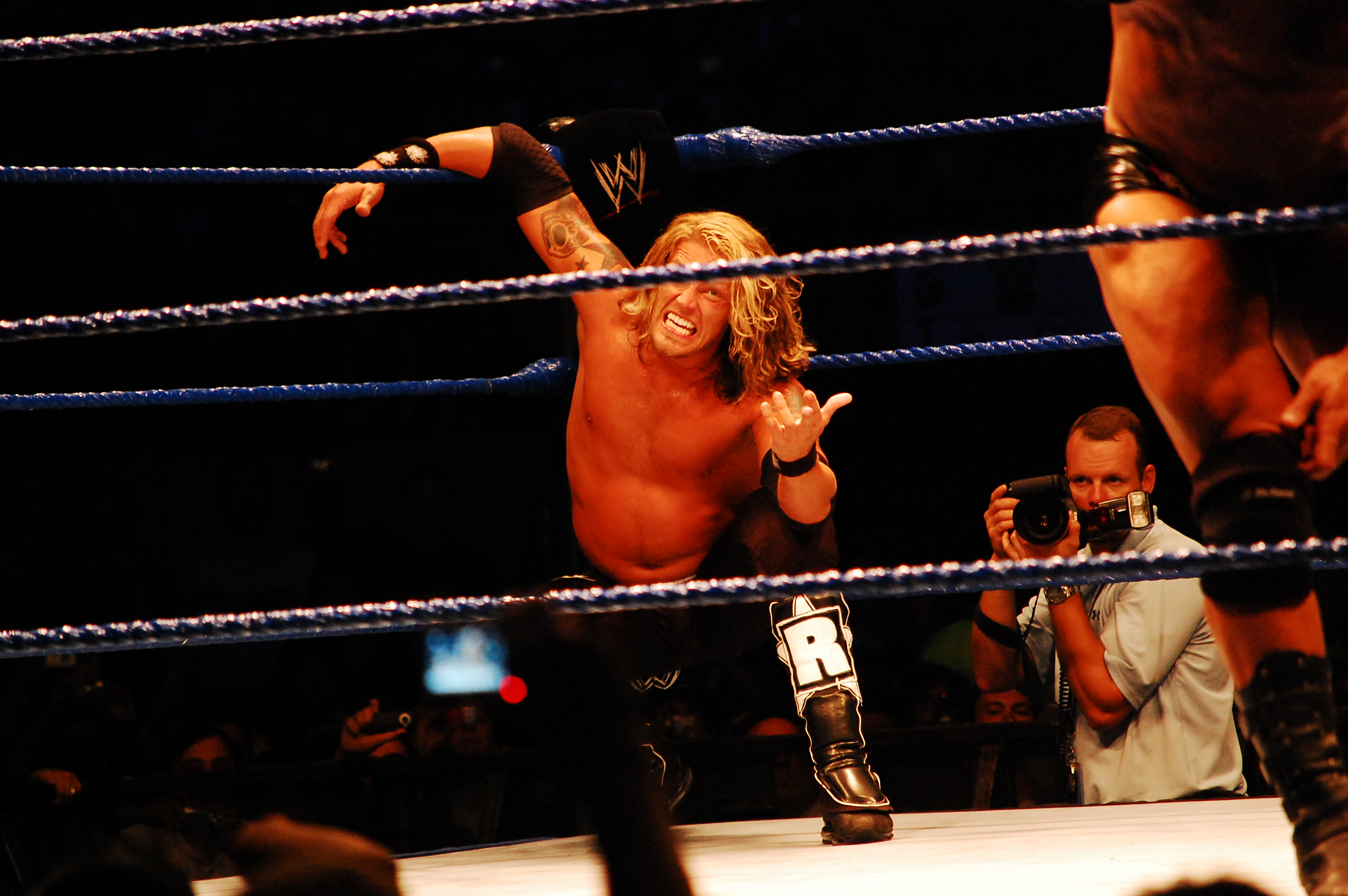 Le catcheur Adam Copeland (alias Edge) s'apprête à effectuer un plaquage (Spear) sur son adversaire.